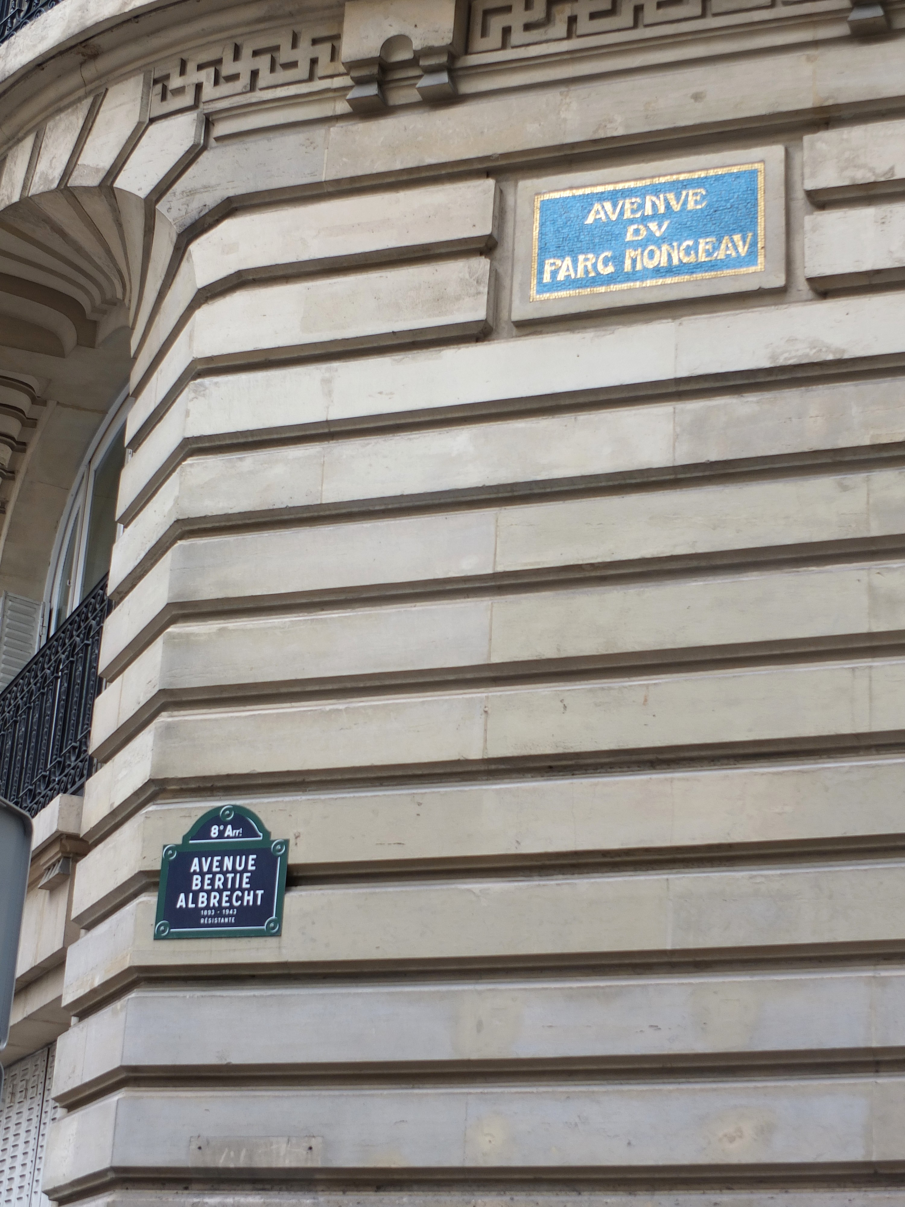 Plaque de rue Avenue Bertie-Albrecht avec l'ancien nom Avenue du Parc Monceau - Paris, 8e arrondissement.